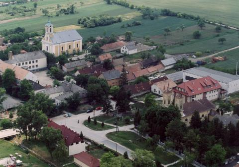 Polgárdi, Hungary, aerialphotography